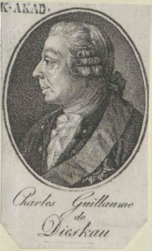 General Karl Wilhelm von Dieskau